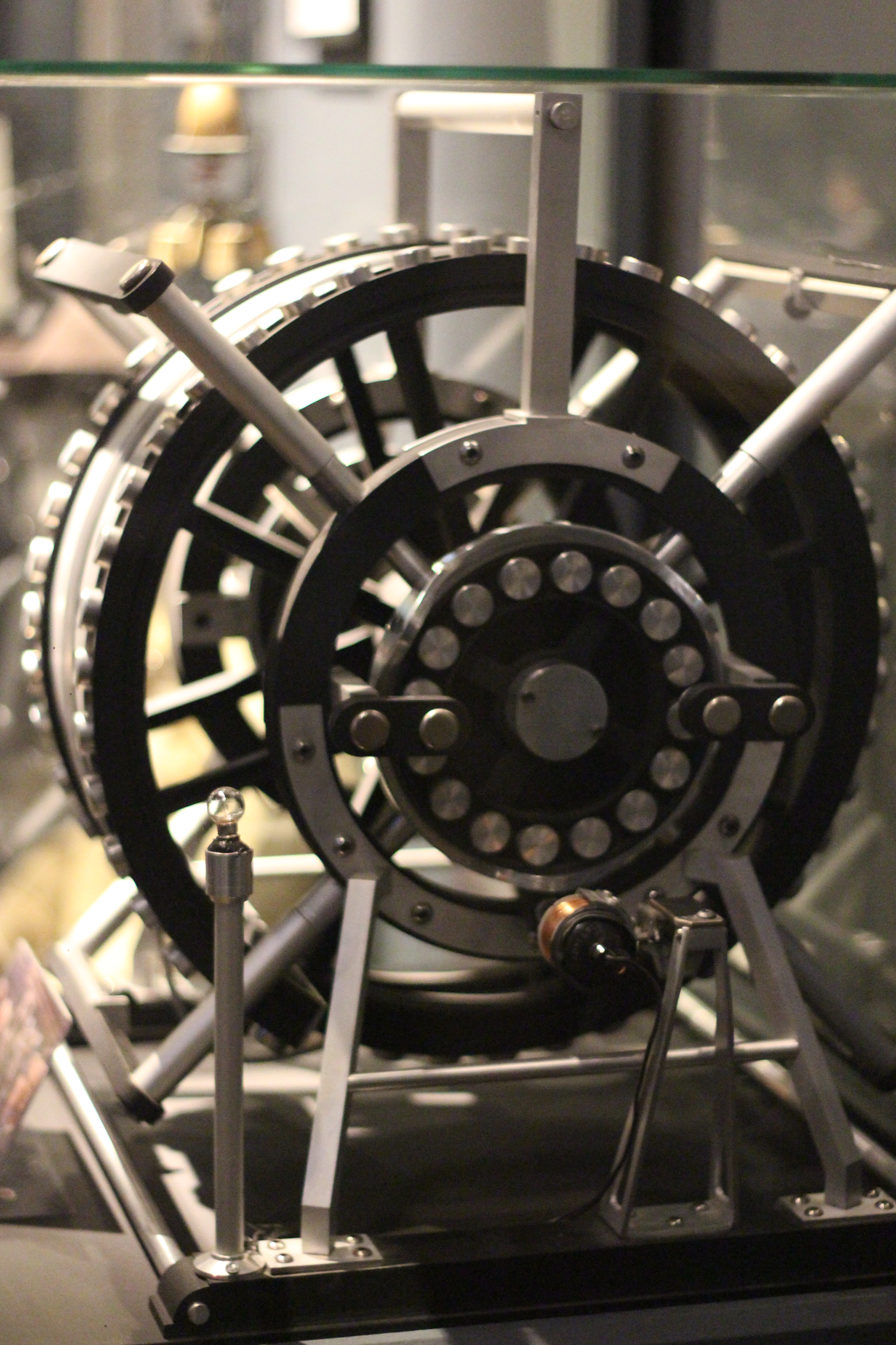 Machine du film L'Extravagant Voyage du jeune et prodigieux T. S. Spivet. Exposition "Caro/Jeunet" au musée Minature et Cinéma en 2018-2019.